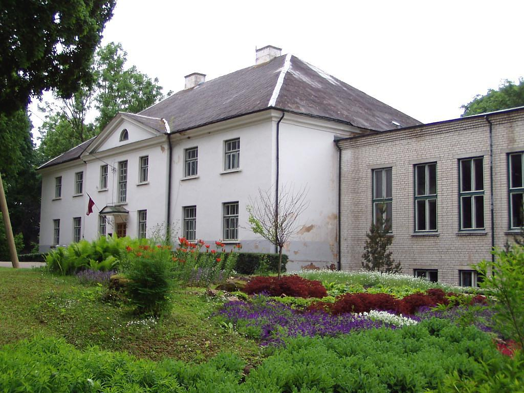 Gaiķu muižas pils, tagad skola 2005-06-23